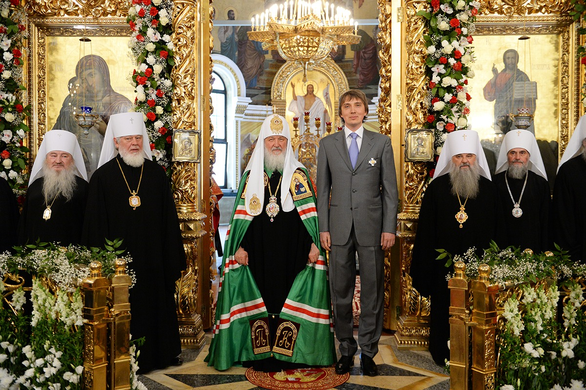 C Патриархо Кириллом